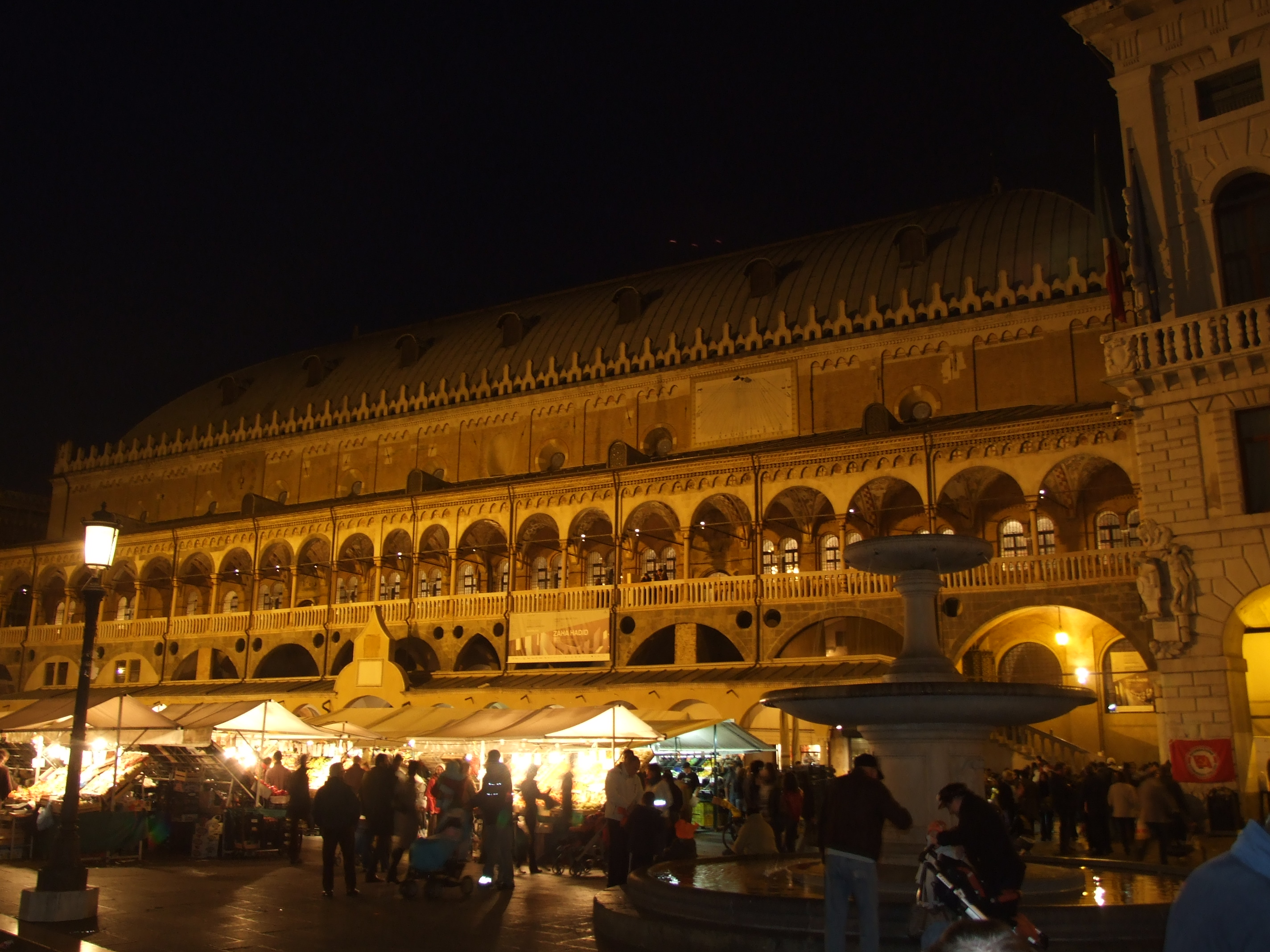 Piazza delle Erbe de Padua.